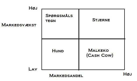 Billede af Bostonmatricens fire typer